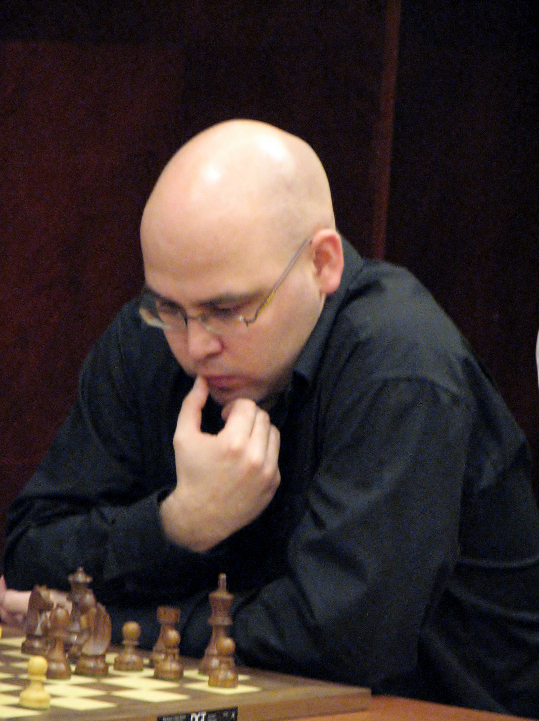 Meelis Kanep kiirmaleturniiril "Meenutades Paul Kerest"